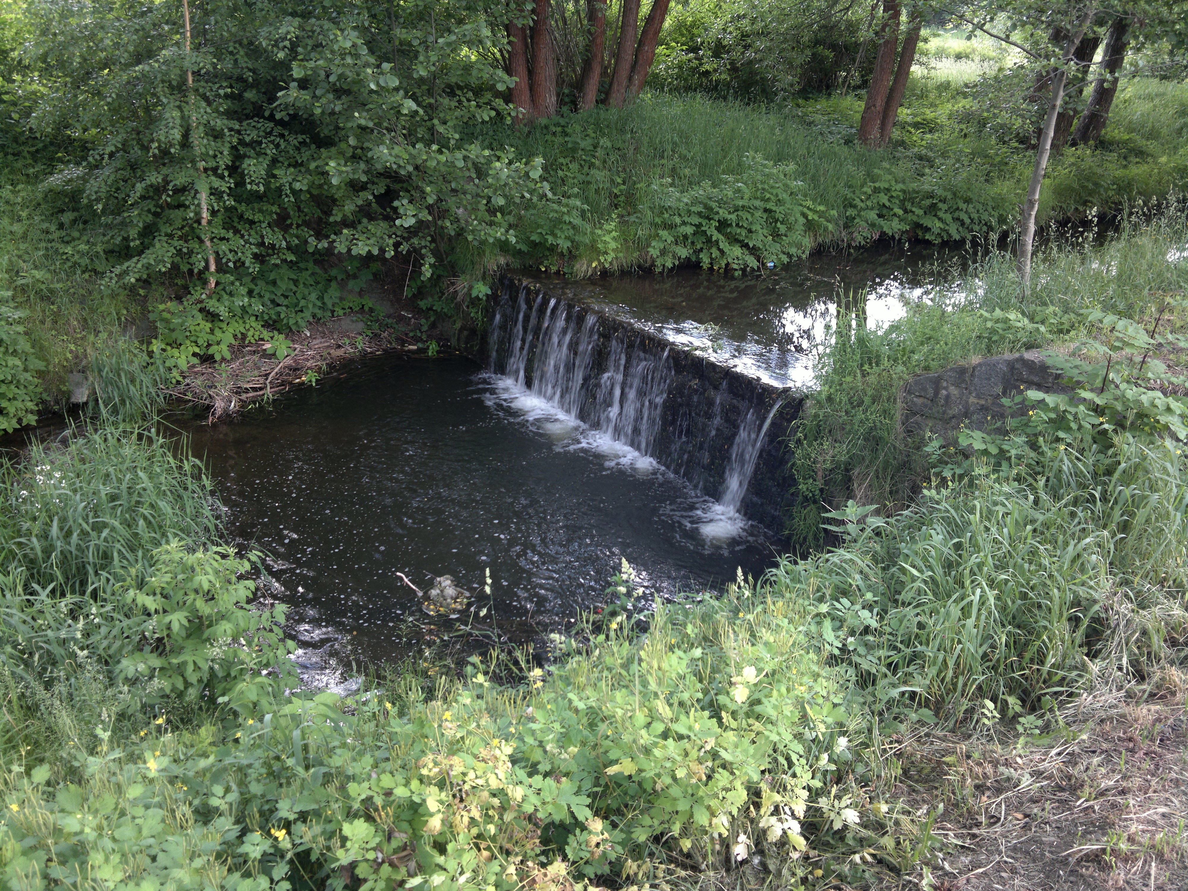 Chuchelský potok nad ústím do Jizery v Semilech